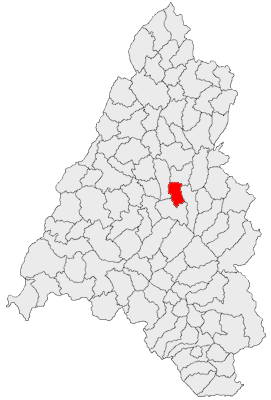 Categorie:Hărţi ale judeţului Bihor